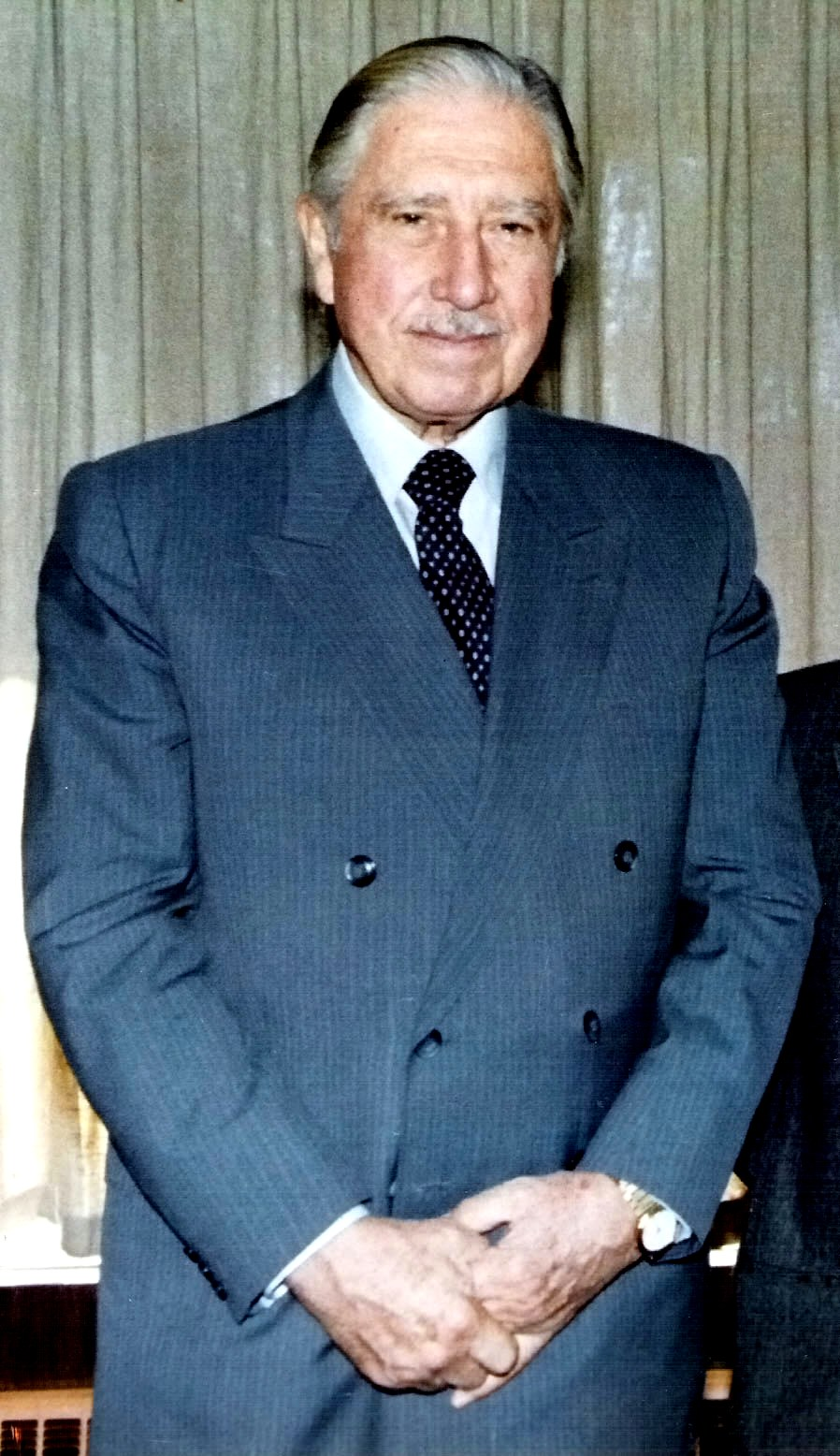 Augusto Pinochet de Civil, sacada por principios de los años 1990 Foto sacada por alguien en La Moneda, Pinochet posando, a su izquierda se puede ver un hombro, ese es pariente mío. NO recuerdo cuándo fue sacada, el tampoco, pero fue por finales de los 1980 ó principios de los 1990, en una visita privada a Pinochet